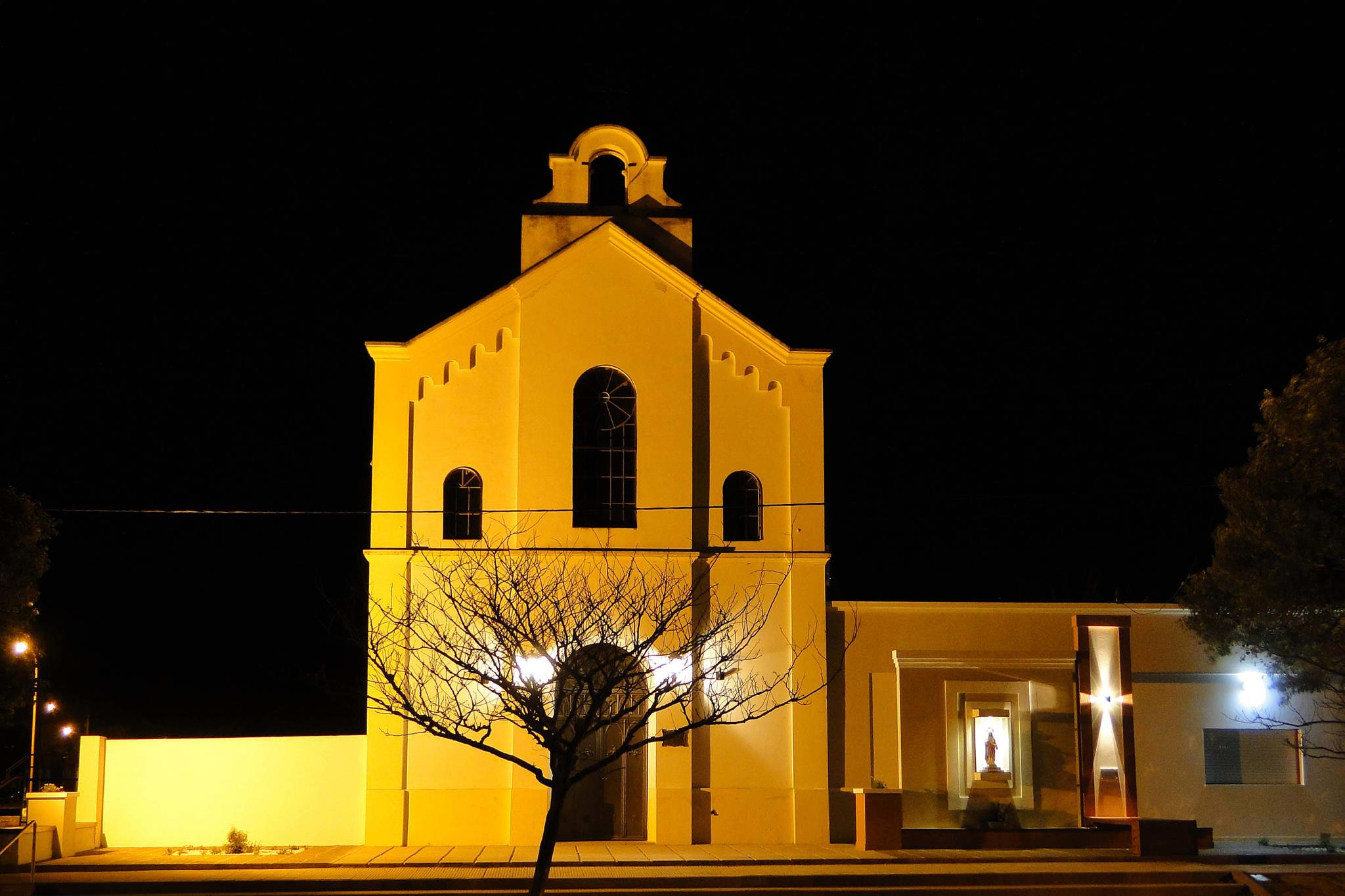 Capilla San Grato, Ubicada en Avenida Córdoba de la localidad de Bengolea, Córdoba, Argentina